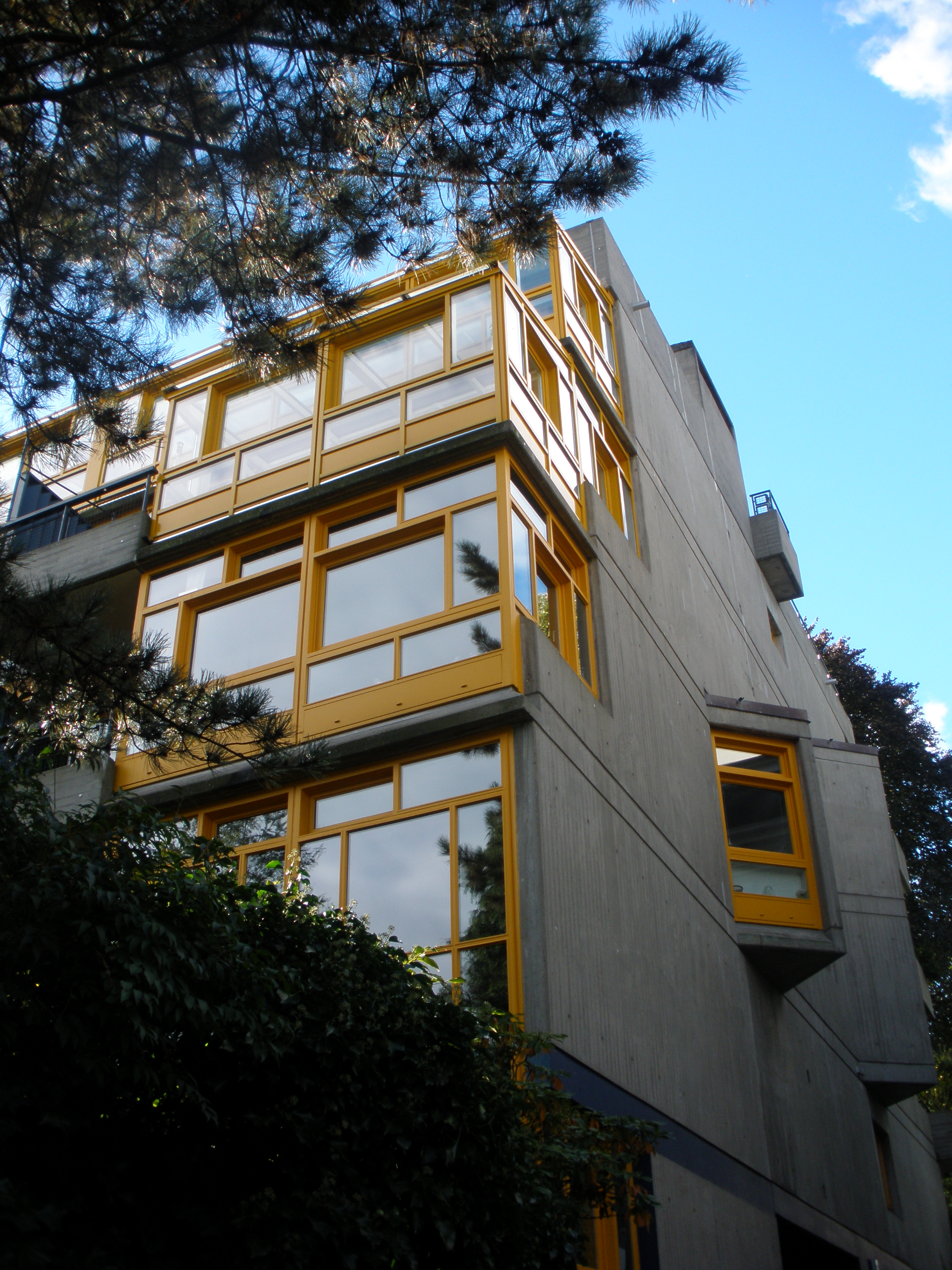 Harvestehuder Weg 55 hamburg harvestehude